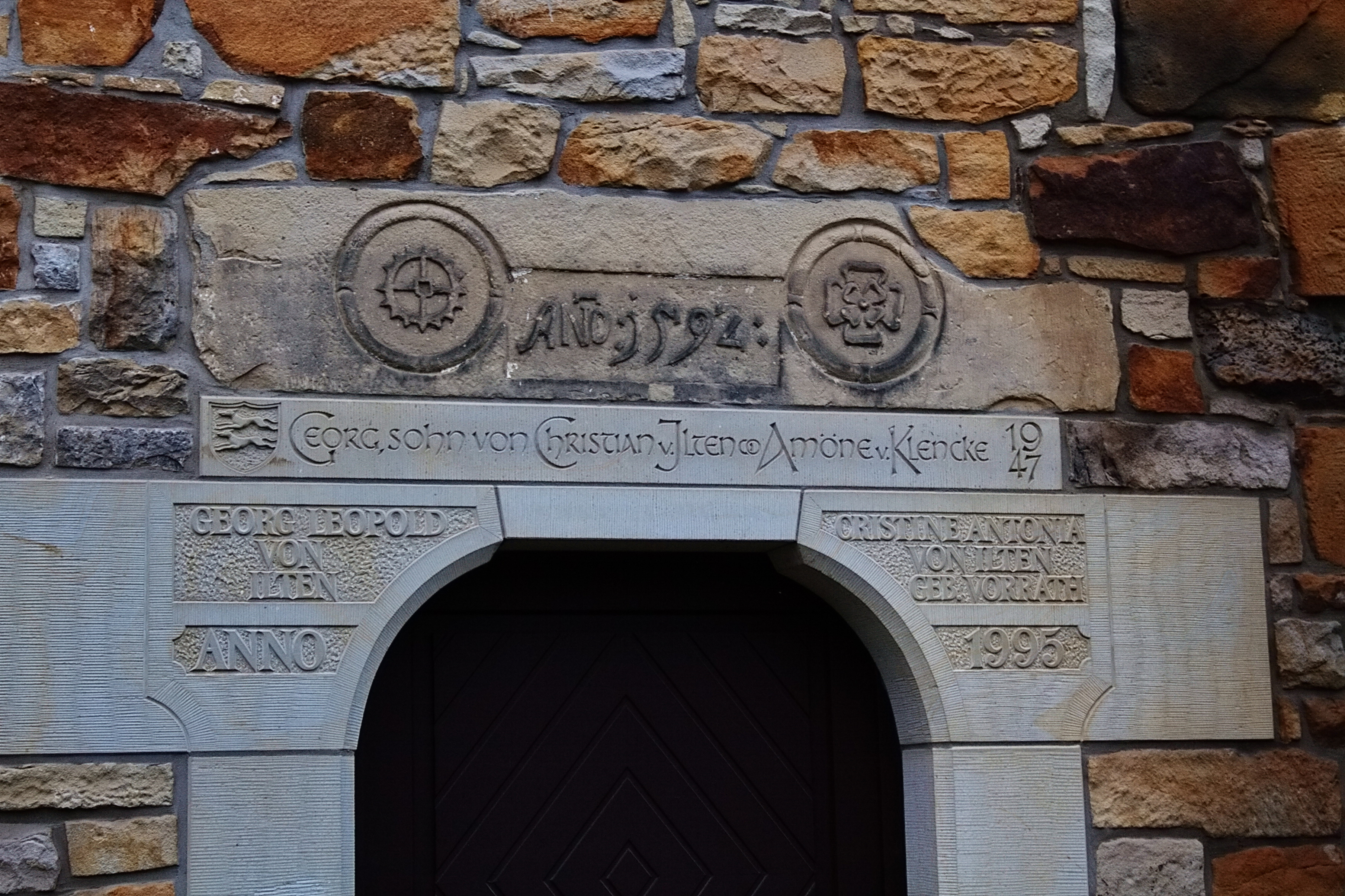 Steininschrift an der alten Wassermühle in Langreder (Barsinghausen), Niedersachsen, Deutschland